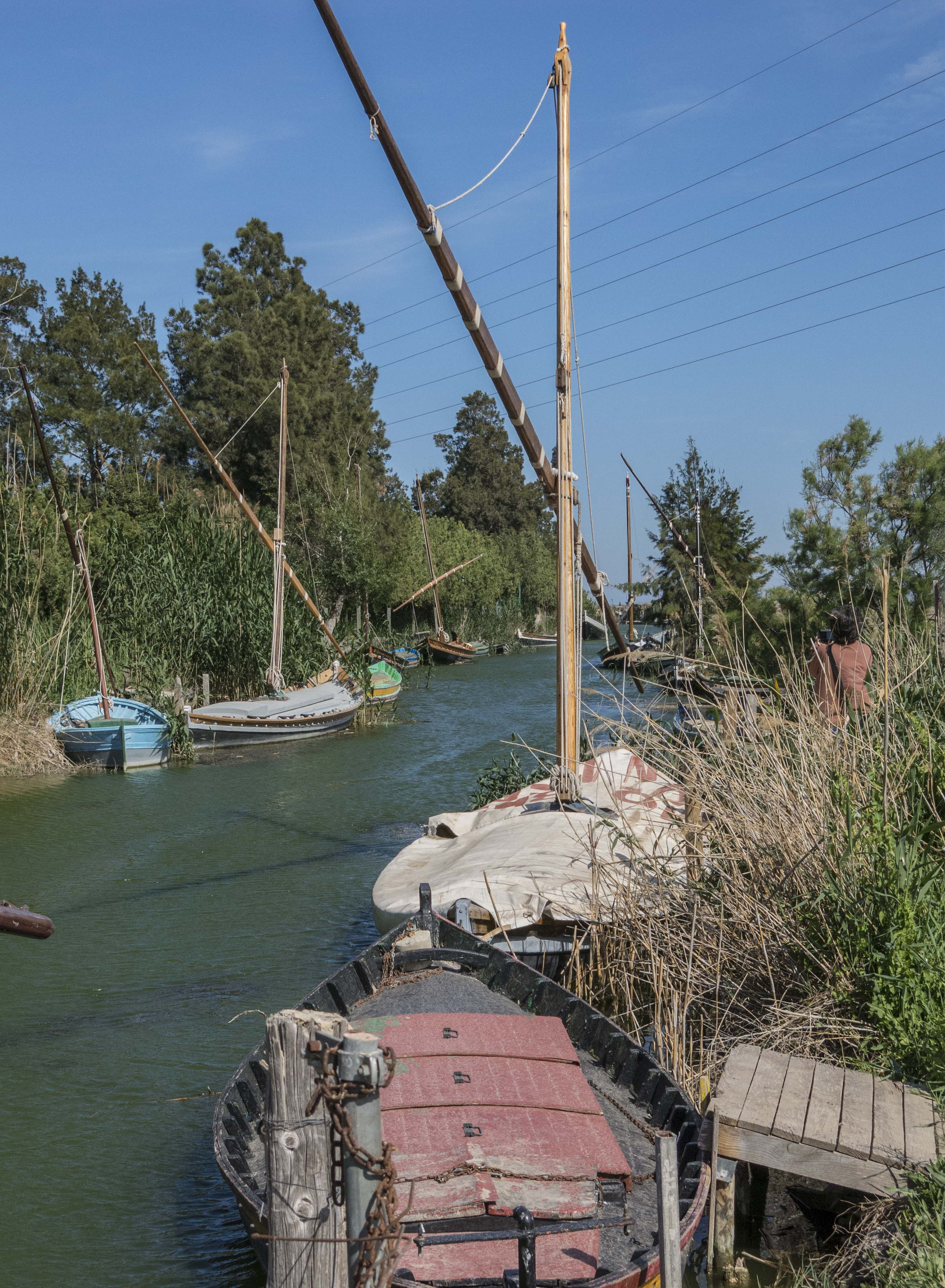 Projecte de col·laboració de l'Arxiu Ismael Latorre Mendoza amb Wikimedia Commons i Amical Wikimedia. El port de Silla està situat al terme de Silla i a 2 quilòmetres de la població, entre l'horta i l'arrossar. Històricament, durant el segle XIII, està acreditada l'activitat pesquera. Al port, a l'època del rei Jaume hi havia unes 60 embarcacions de pesca.